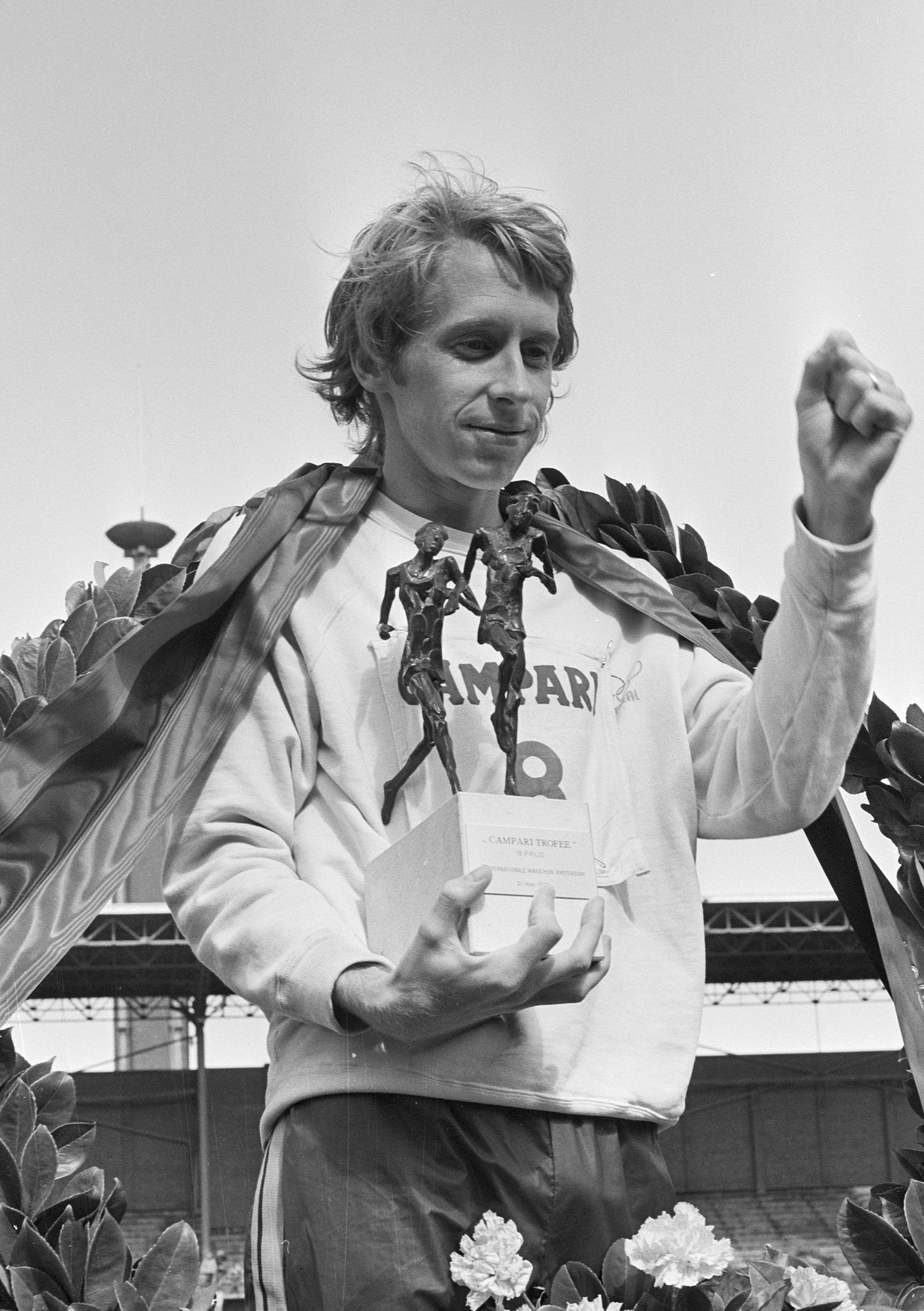 Derde internationale marathon van Amsterdam; winnaar Rodgers (VS) tijdens huldiging